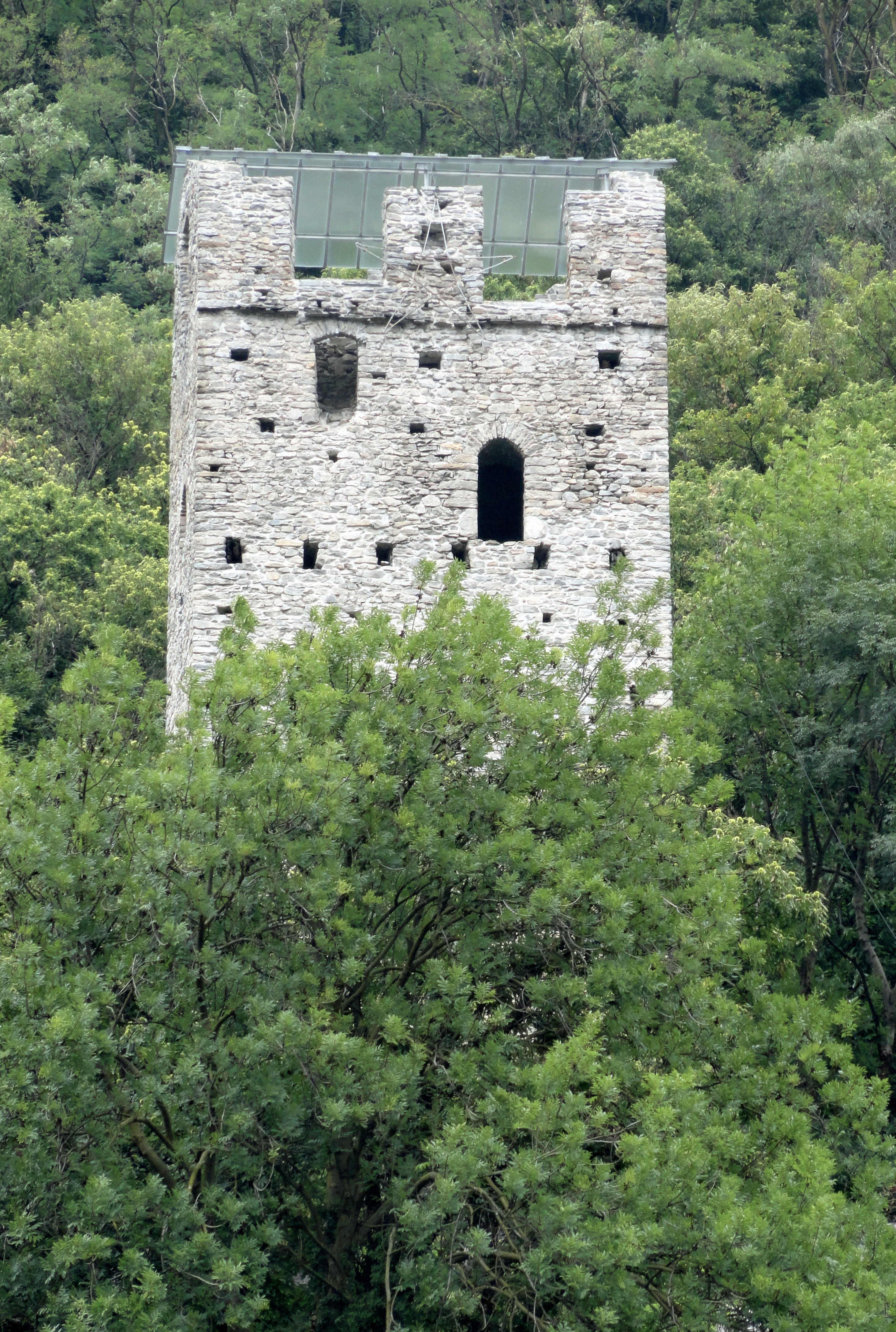 Torre Palas